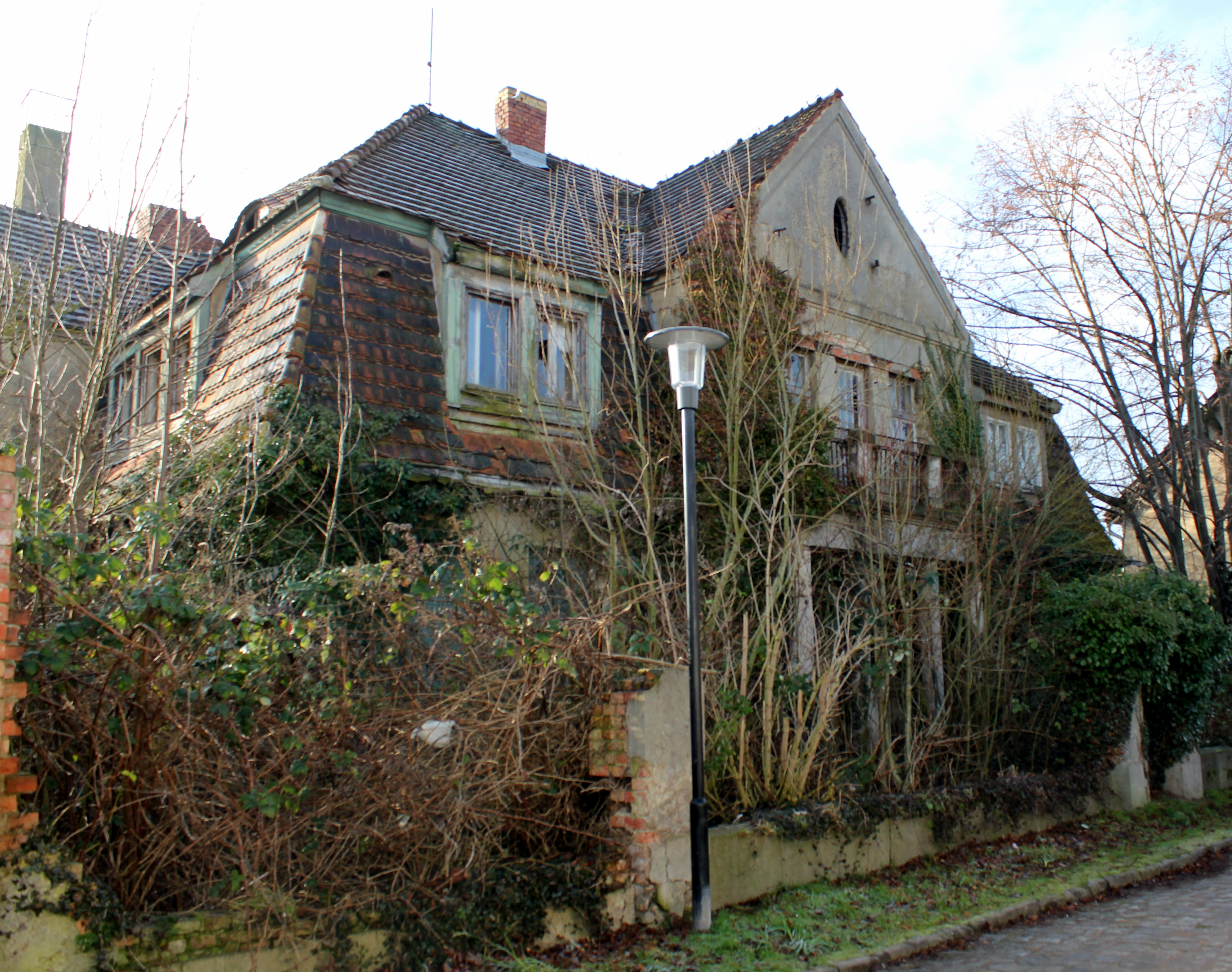 Villa Lange Str x neben Nr 10, Eickendorf (Bördeland)